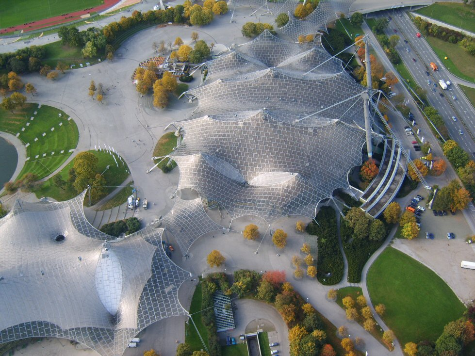 Olympiahalle vom Olympiaturm aus gesehen. Links unten ist die Olympia-Schwimmhalle zu sehen.